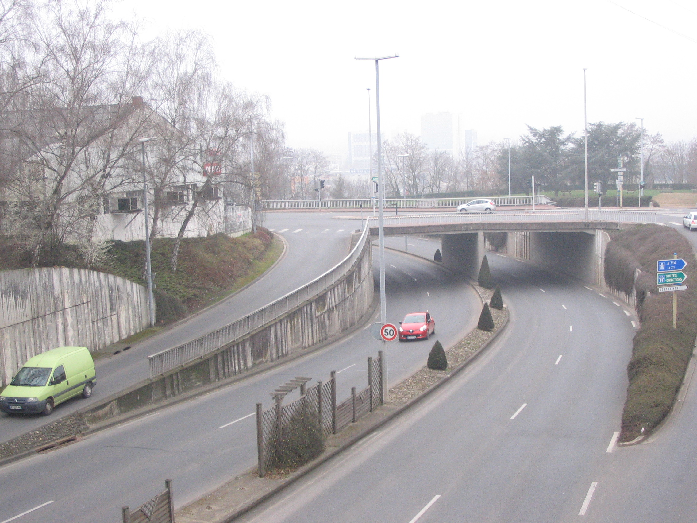 Le boulevard Salvador Allende croise l'avenue de Gaulle à Montluçon (03).